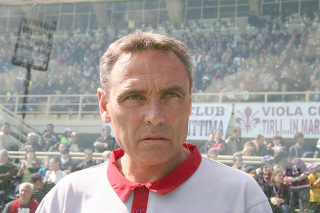 Reggina Calcio coach, Nevio Orlandi